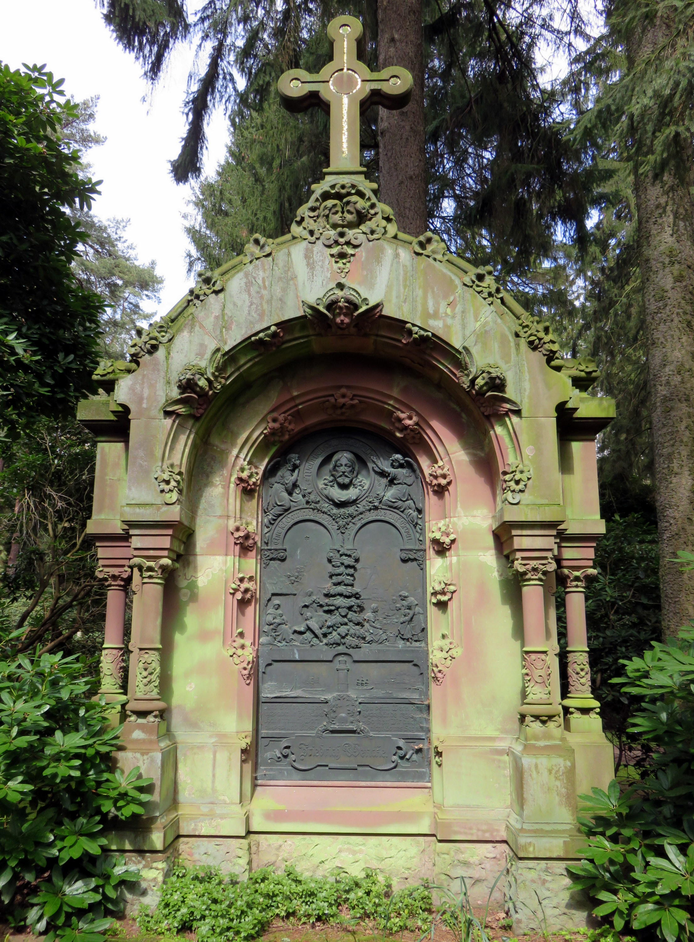 Grabmal für den deutschen Reeder Friedrich Wencke, 1904 errichtet von Architekt Wilhelm Cordes und Bildhauer Xaver Arnold auf dem Hamburger Friedhof Ohlsdorf, Planquadrat V 26.